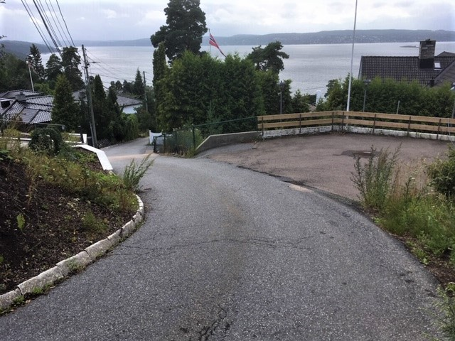 Krokkleiva Oslo august 2019